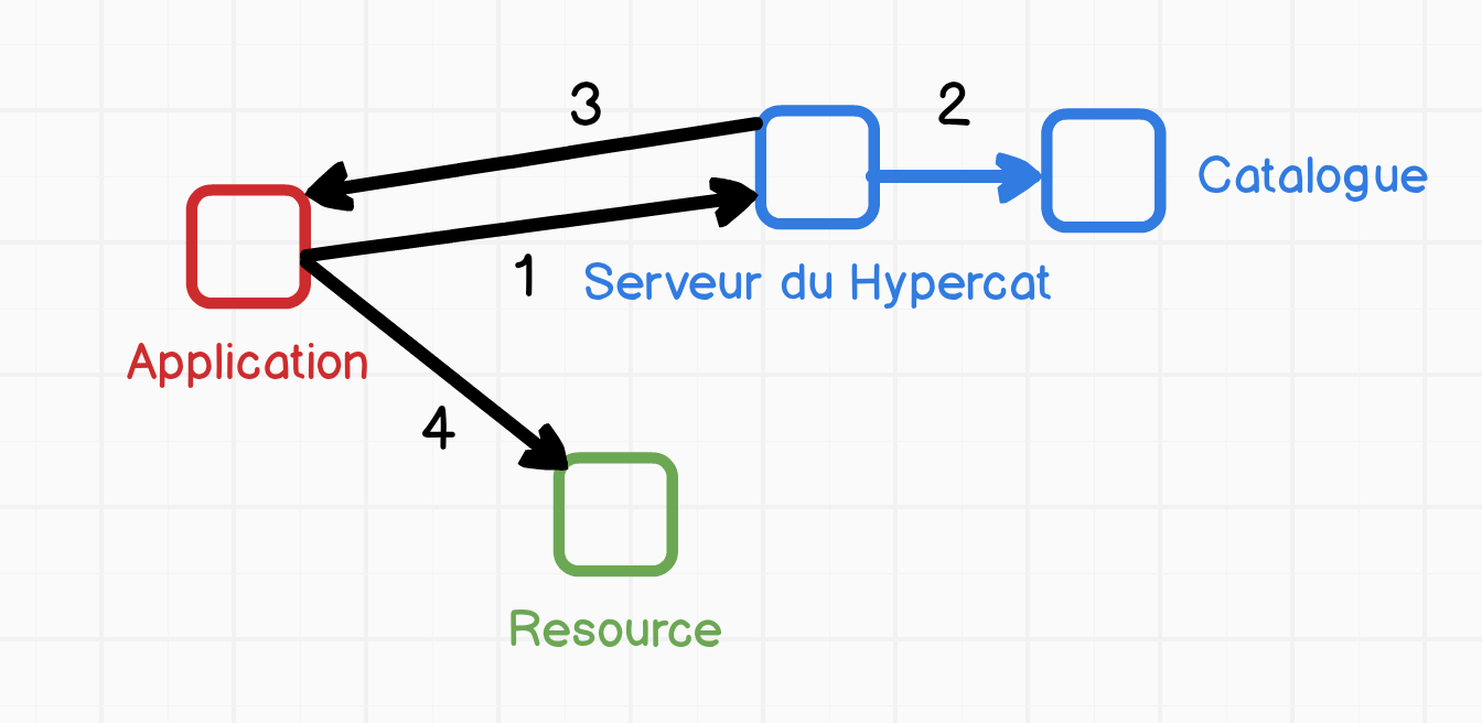 Diagramme sur l'interaction entre une application et le Hypercat